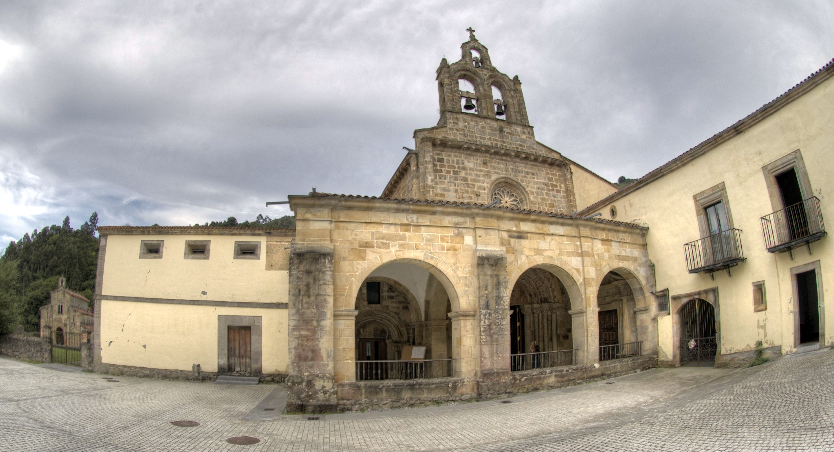 Adosada al monasterio del mismo nombre, su construcción ocupó desde 1218 hasta finales del siglo. En esta vista se aprecia la Iglesia prerrománica de San Salvador a la izquierda.